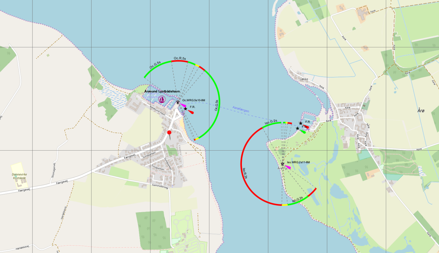 Das Leuchtfeuer von Aarøsund in der Seekarte